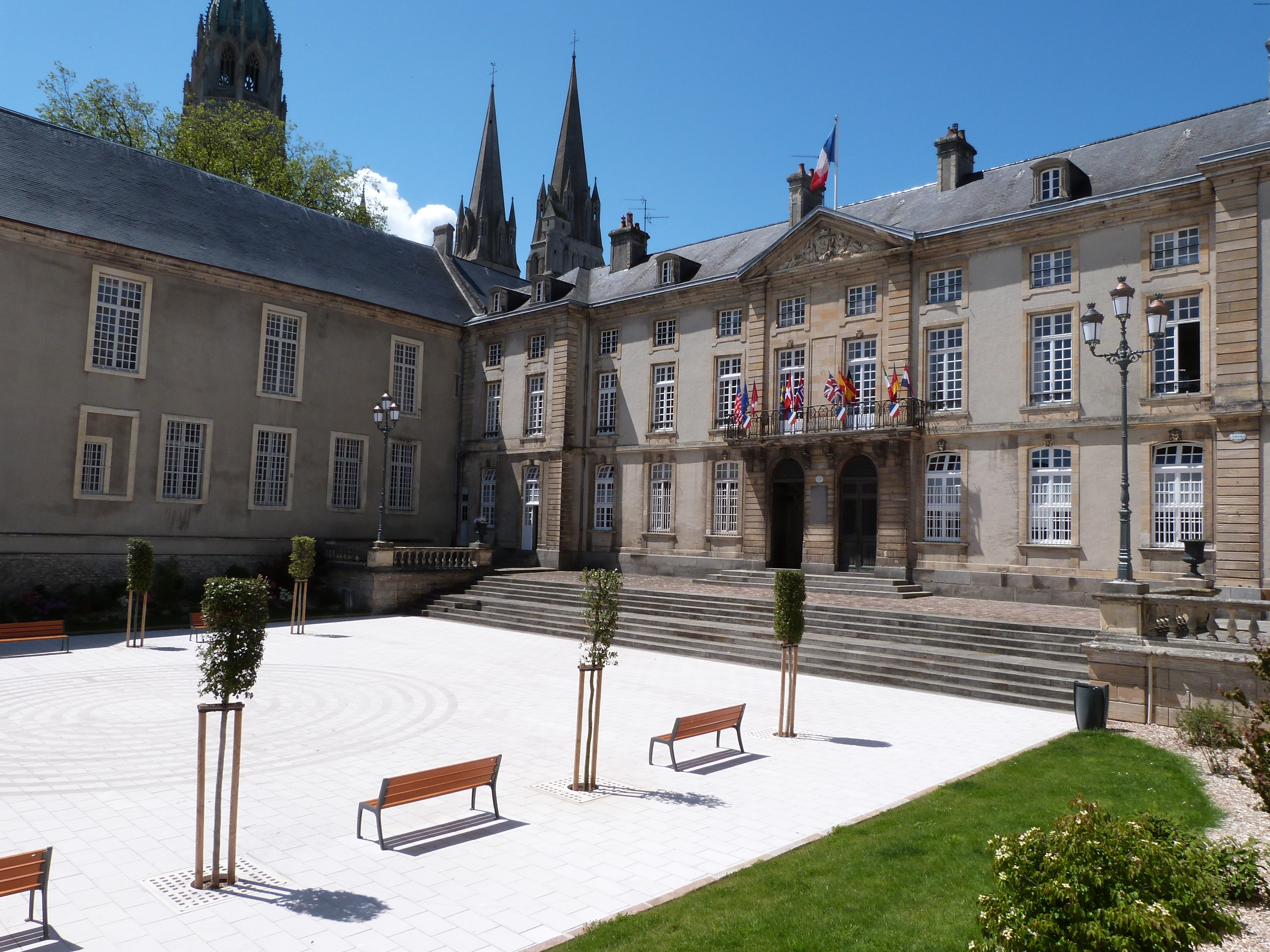 Marie Bayeux